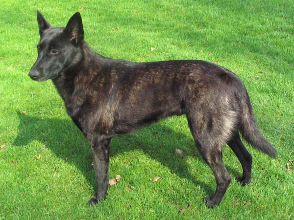 Hollandse herder korthaar. Zelf gemaakte foto. Categorie:Afbeelding hond